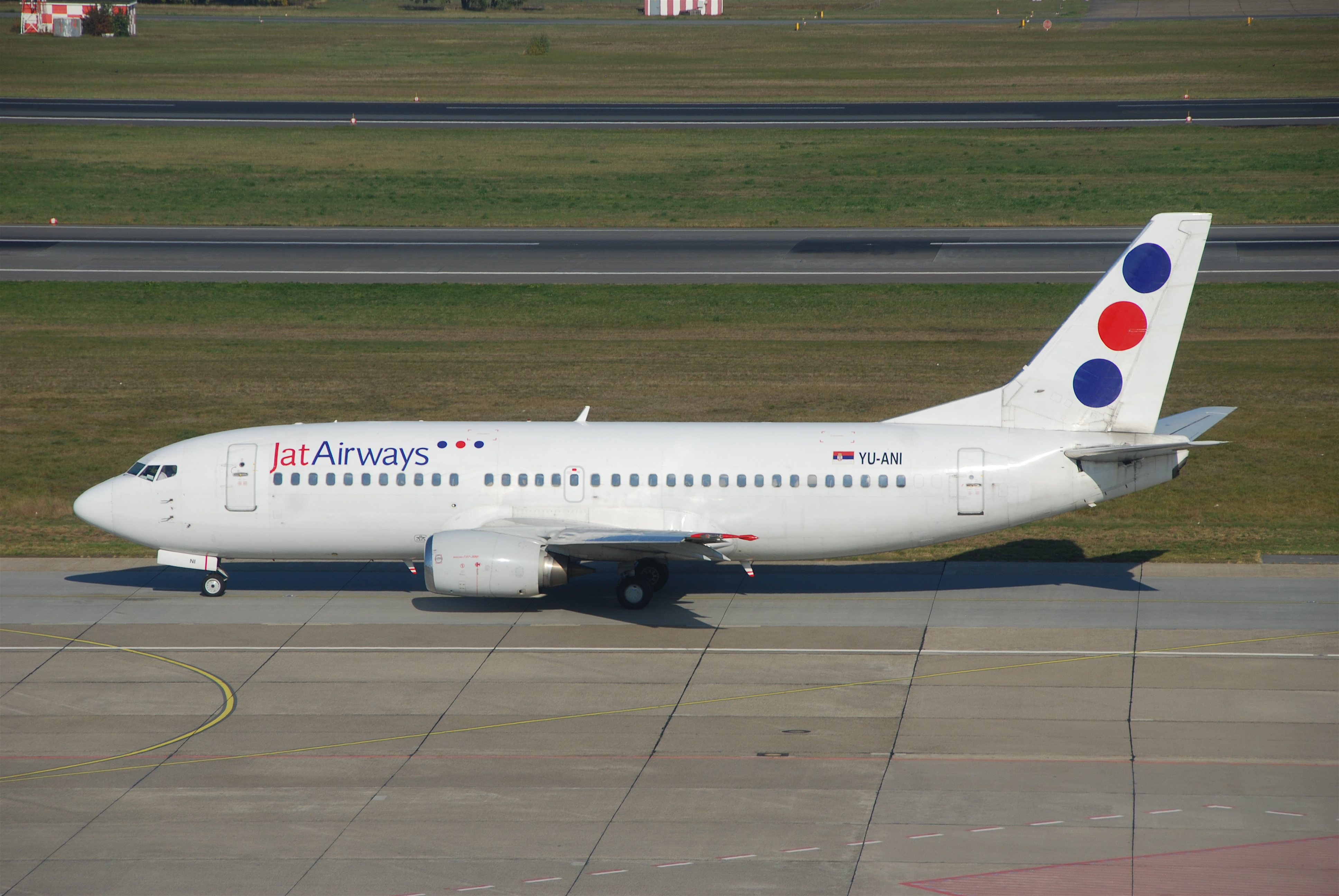 Jat Airways Boeing 737-300; YU-ANI@TXL;18.10.2010/588bt